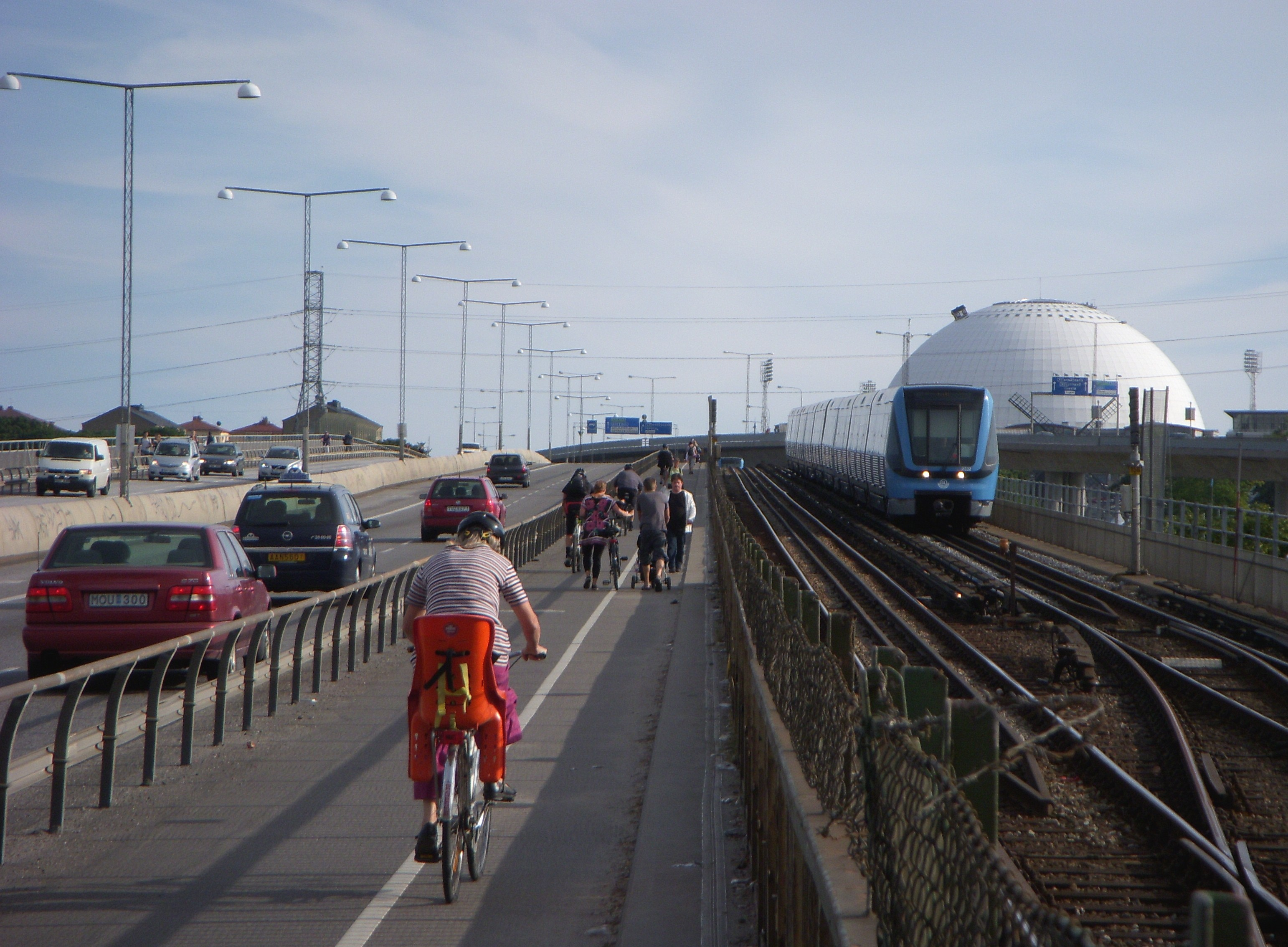 Skanstullsbron i Stockholm, södergående rikning